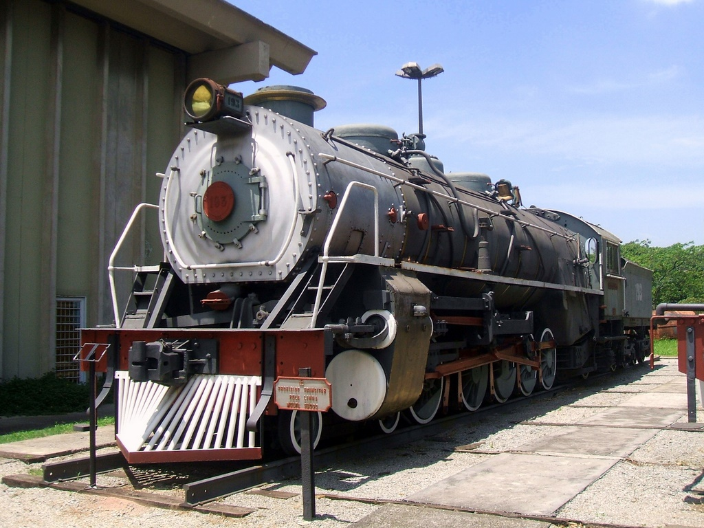 Dampflok von Henschel, Baujahr 1936 der Sammlung des Technikmuseums von Sao Paulo, Brasilien.